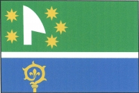 Horní Studénky, okres Šumperk, vlajka obce. List tvoří tři vodorovné pruhy, zelený, bílý a modrý, v poměru 9 : 1 : 6. V žerďové polovině zeleného pruhu bílá radlice hrotem k hornímu a ostřím k vlajícímu okraji listu, provázená po stranách pěti ( 2, 3 do oblouku) žlutými osmicípými hvězdami. V modrém pruhu pod radlicí vyrůstá z dolního okraje listu hlavice žluté berly se závitem zakončeným lilií a obráceným k žerďovému okraji listu. Poměr šířky k délce listu je 2 : 3.